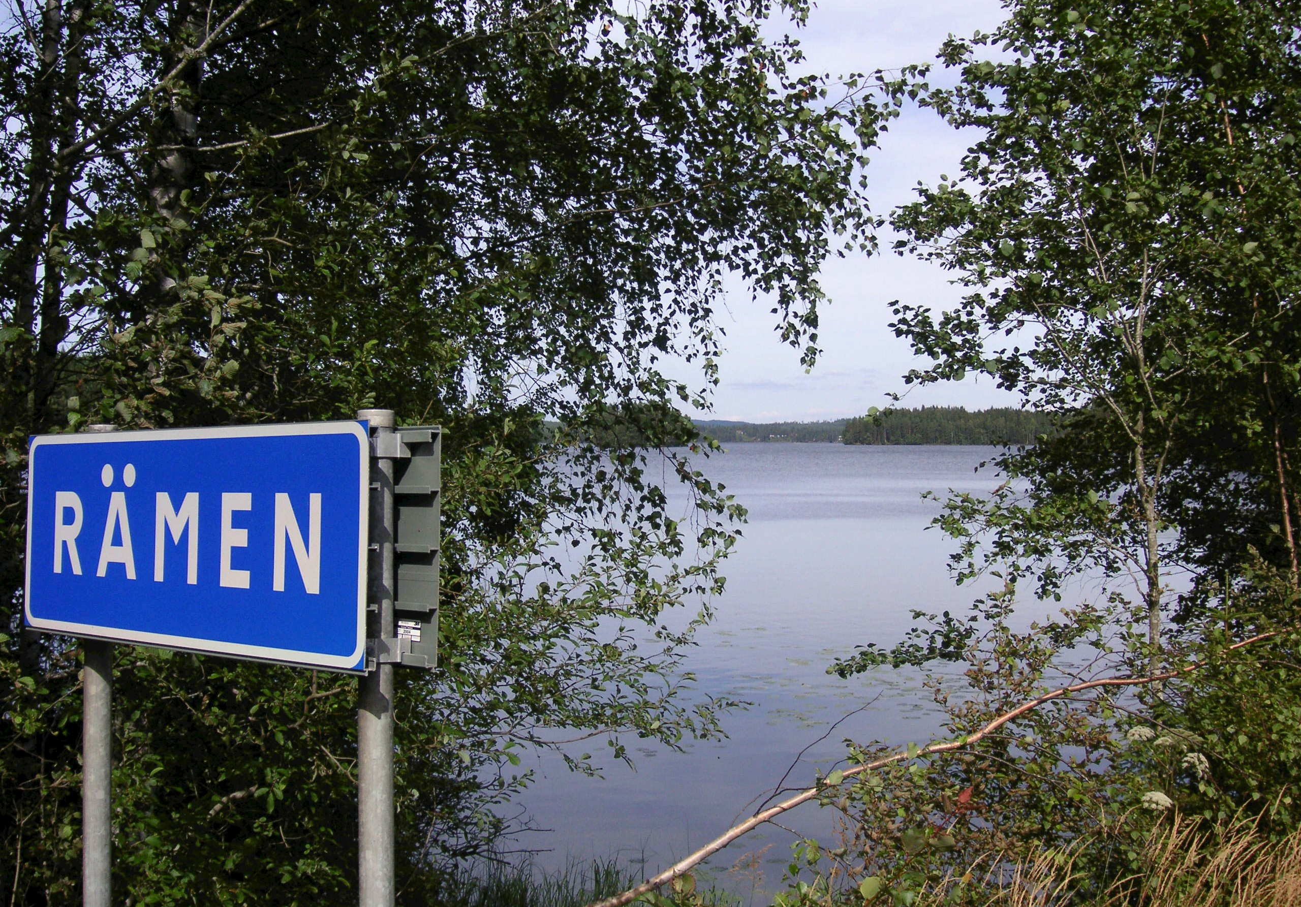 Sjön Rämen i Dalarna